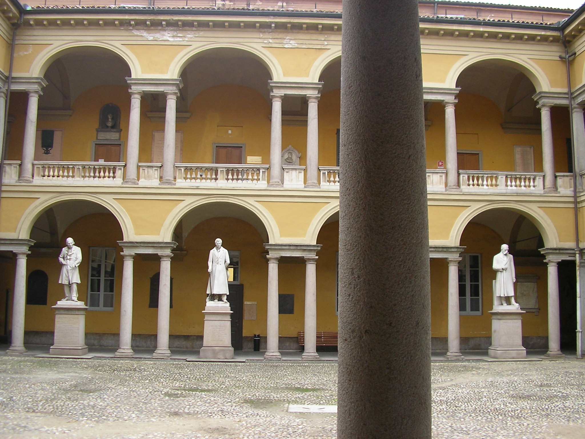 Cortile dell'Università di Pavia